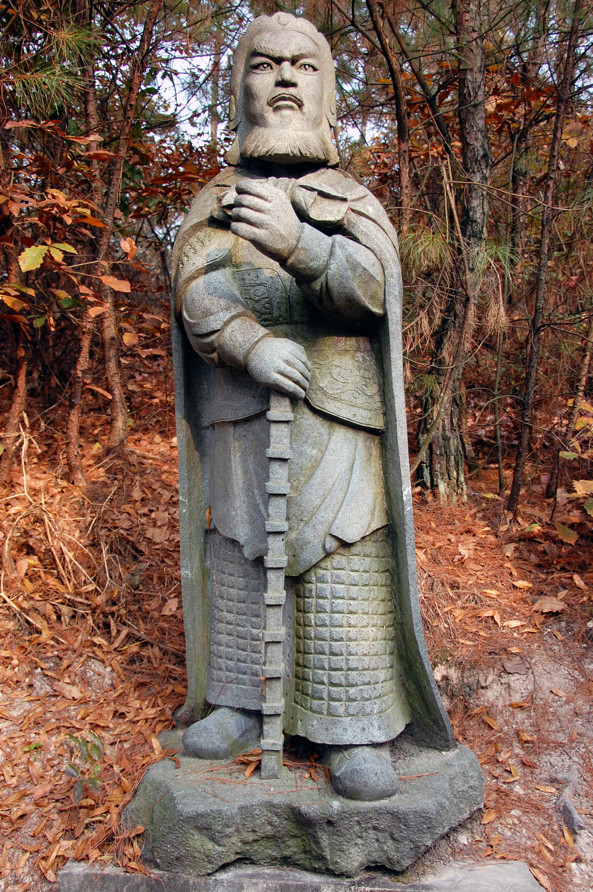 清明上河図/清明上河图